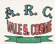 Símbolo da ARC Vale S. Cosme desde a fundação até 30 de Outubro de 2008.